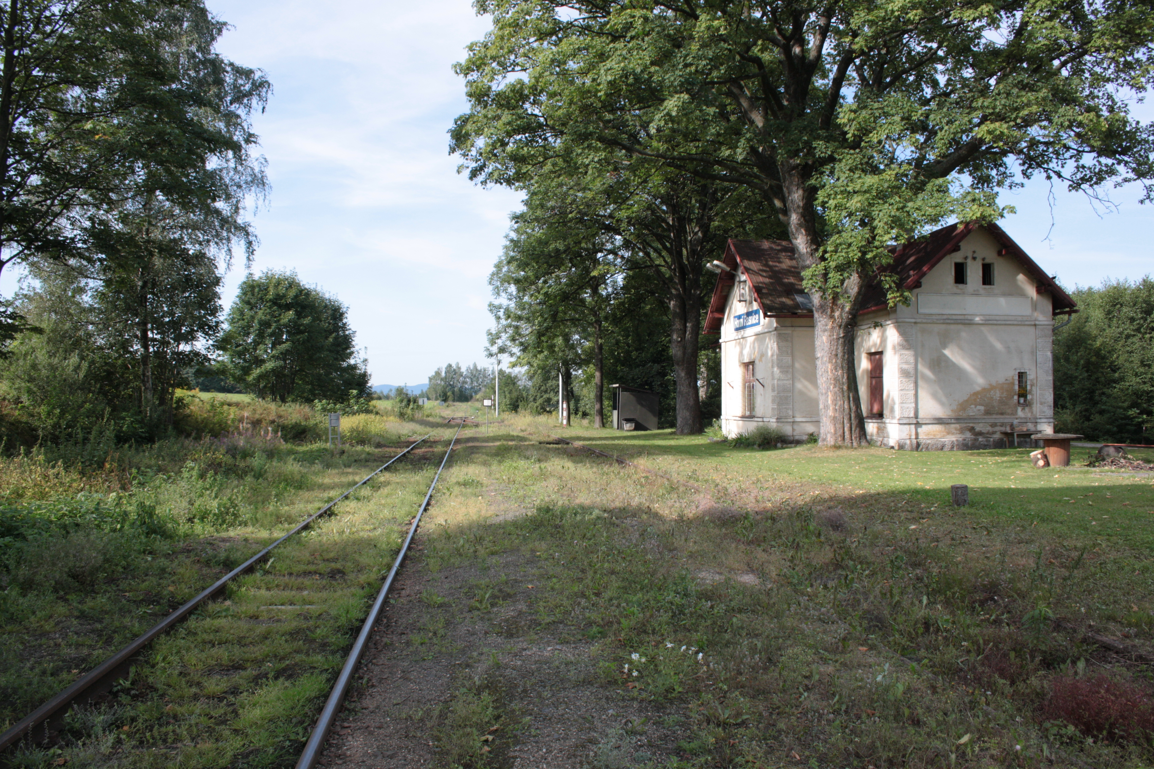 This photograph was taken with a DSLR from WMCZ's Camera grant. Pohled od severovýchodu na staniční budovu železniční zastávky Horní Řasnice a na koleje směřující do Nového Města pod Smrkem.